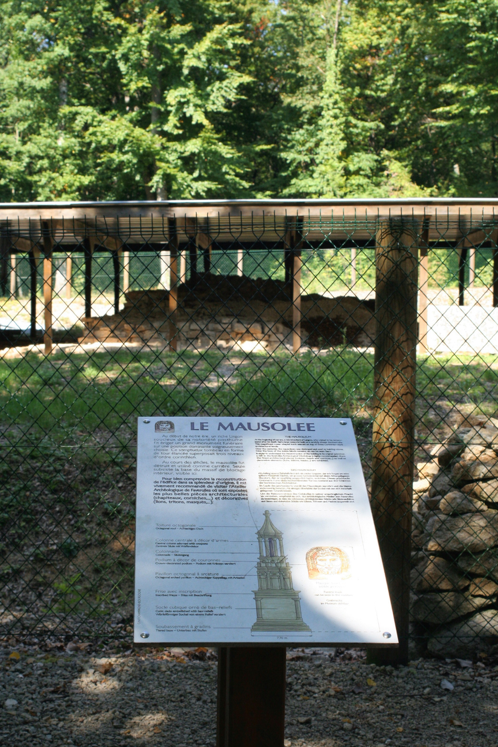 le site du mausolée de Faverolles, en Haute-Marne.